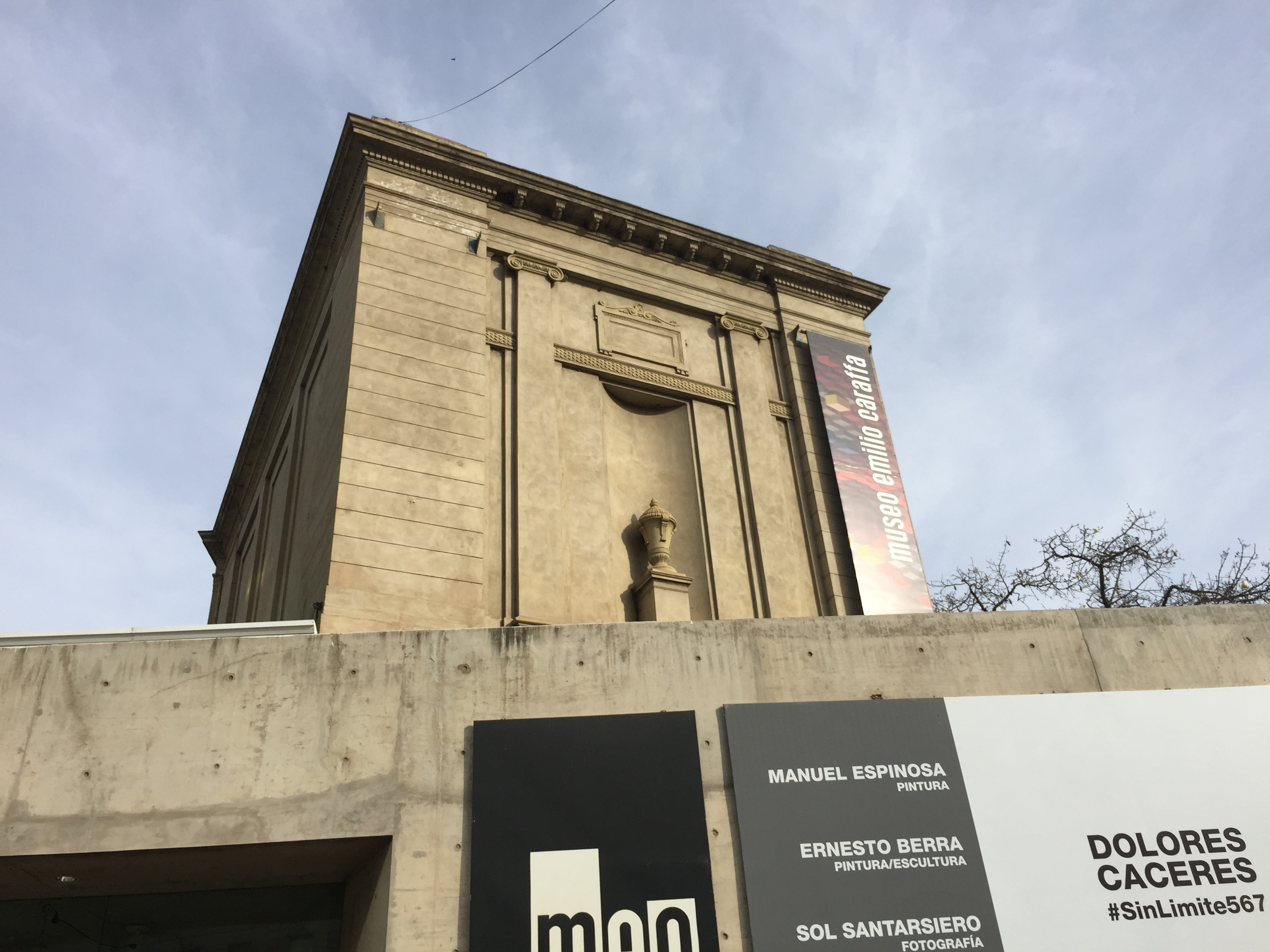 En esta imagen se muestra el lado lateral del edificio en el cual se encuentra el Museo de Bellas Artes